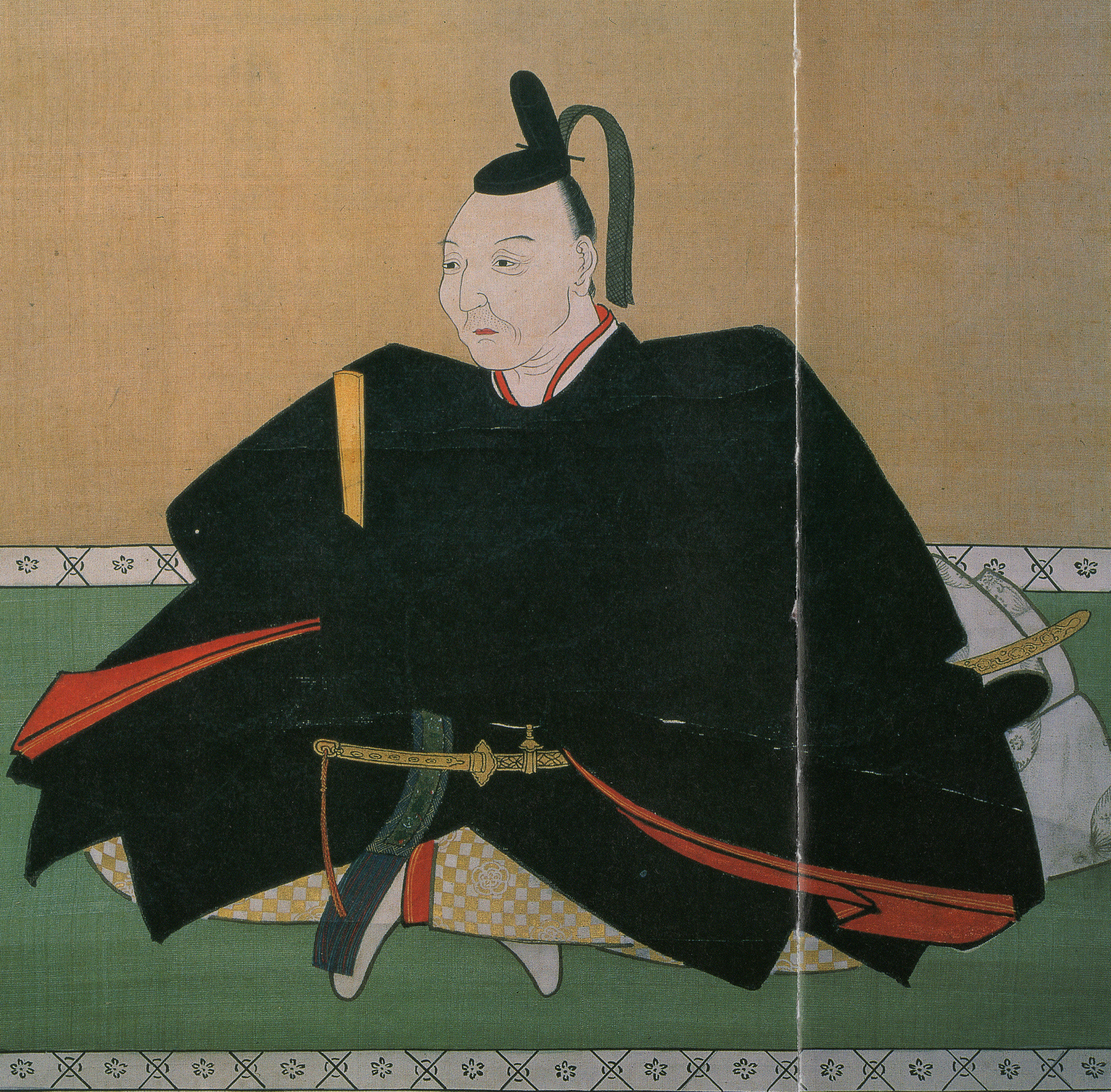 織田高長の肖像。